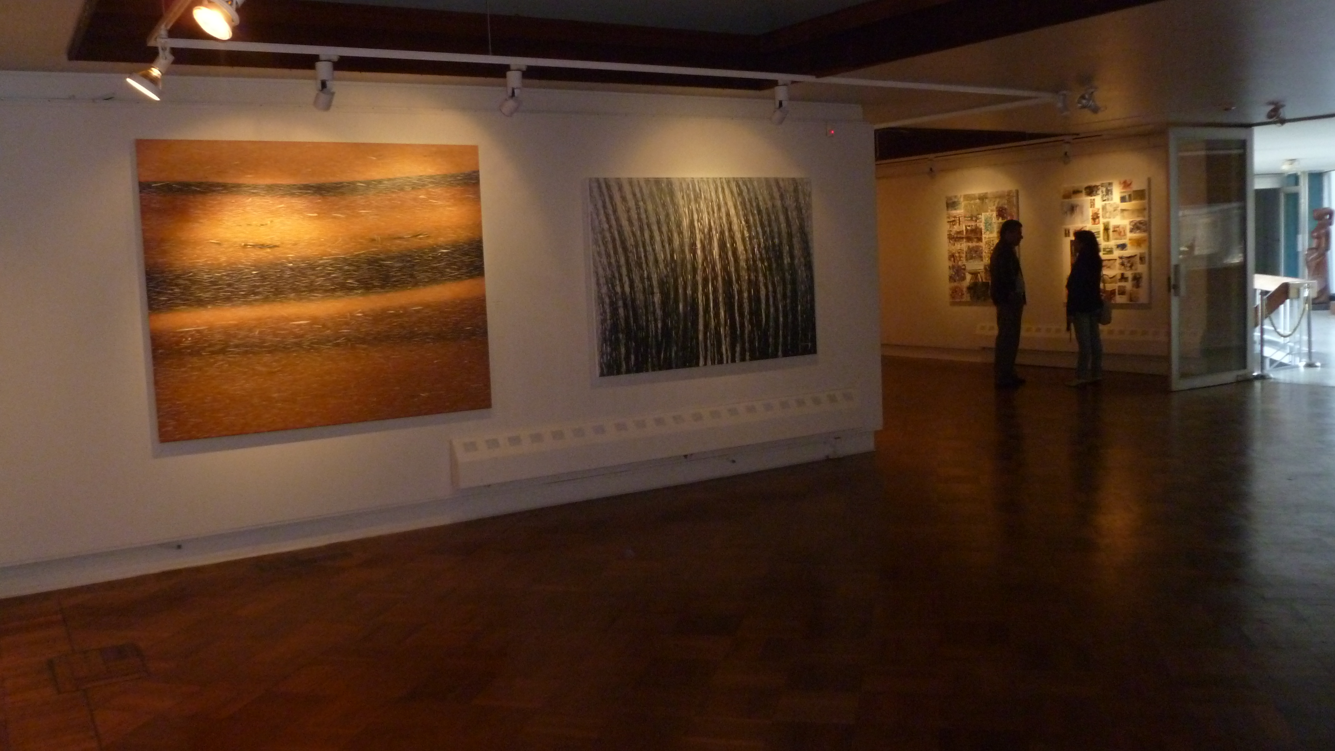 casa del arte sala marta colvin, udec